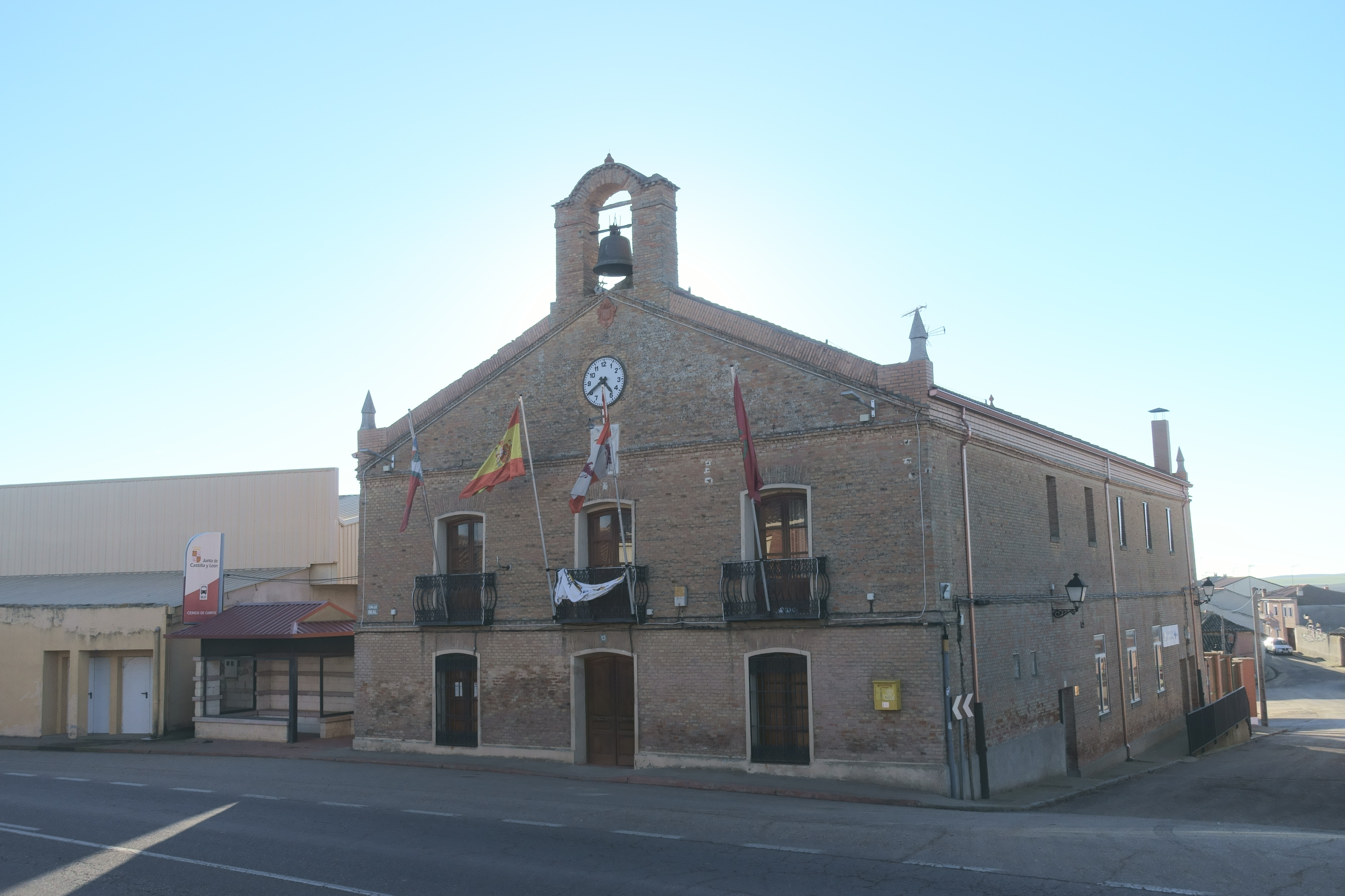 Casa consistorial de Ceinos de Campos (Valladolid, España).